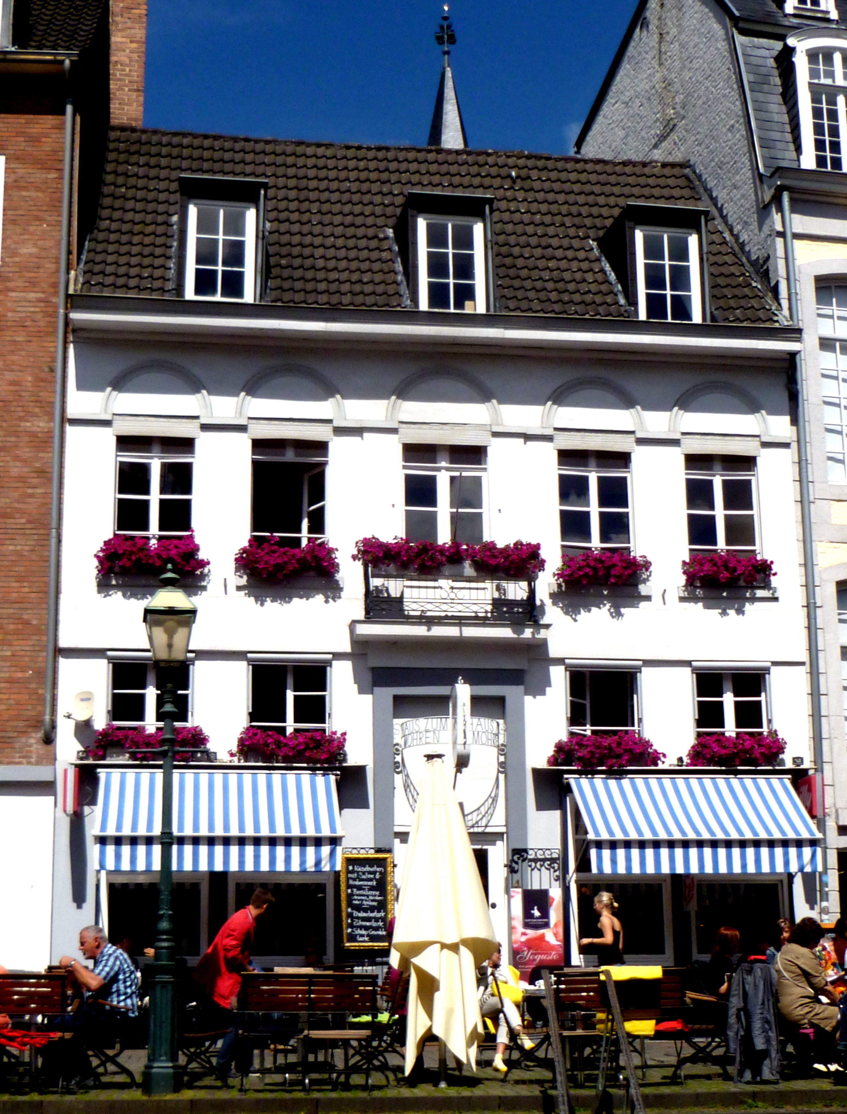 Baudenkmal in Aachen-Mitte